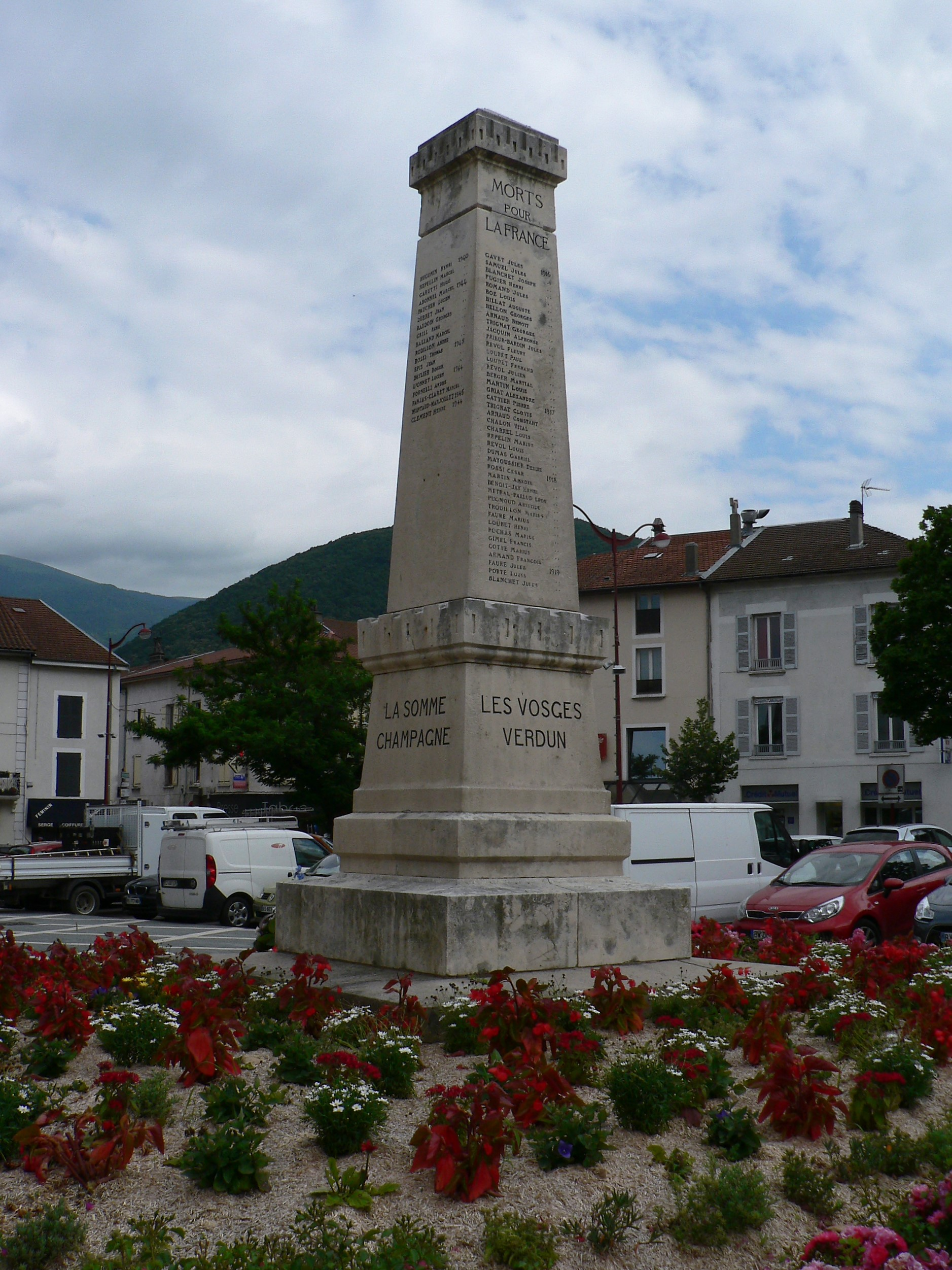 monument aux morts. Vif, Isère, AuRA, France.